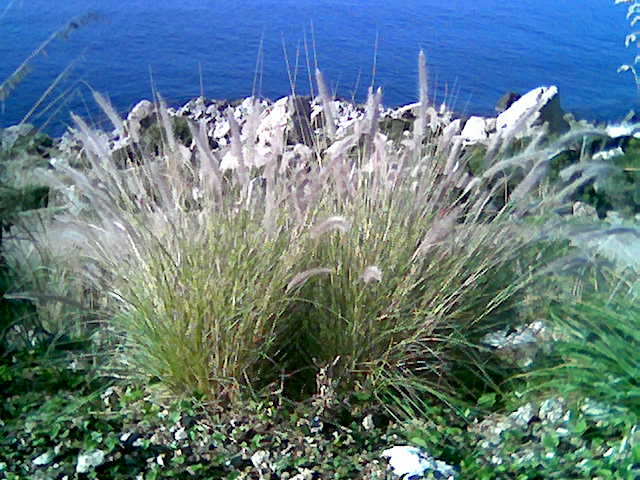 Riserva naturale Capo Gallo, Sicily